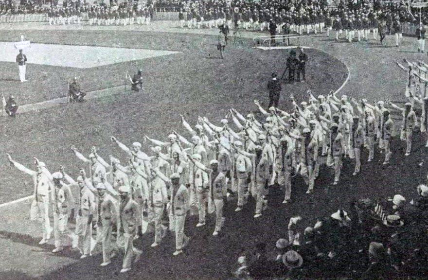 Défilé de la délégation française au stade olympique d'Anvers en 1920.